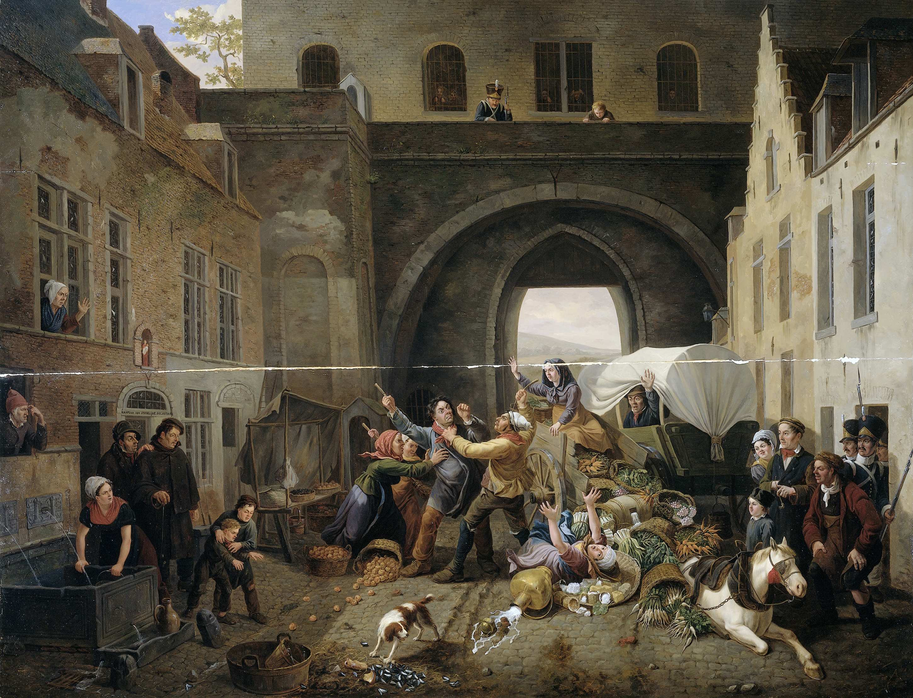 Een aanrijding bij de Halpoort te Brussel. Een vechtpartij tussen twee voerlieden na een botsing tussen twee wagens. Een vrouw spartelt tussen de omgevallen manden met groenten en melkbussen. Links het belastingkantoor en een fontein.